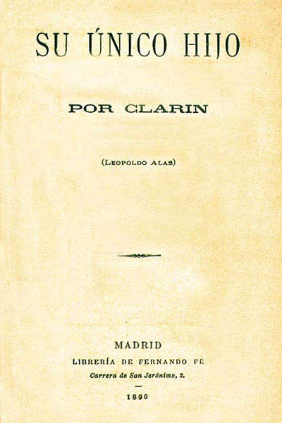 Portada de la primera edición de "Su único hijo", Librería de Fernando Fé, Madrid, 1890